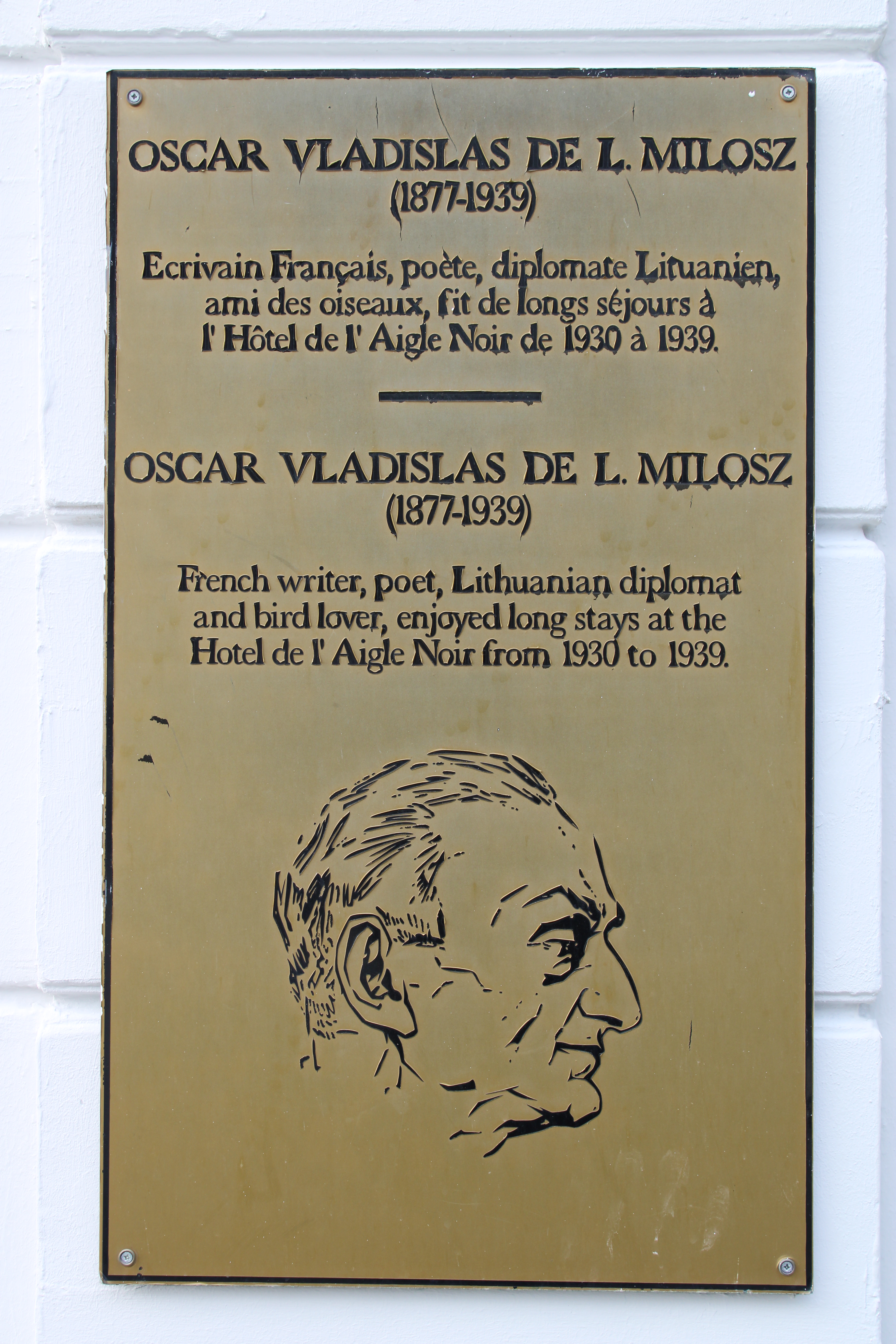 Plaque témoignant des séjours d'Oscar Vladislas de Lubicz-Milosz à l'hôtel de l'Aigle Noir de Fontainebleau